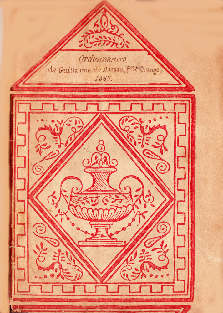 Ordonnances de la principauté d'Oange 1567